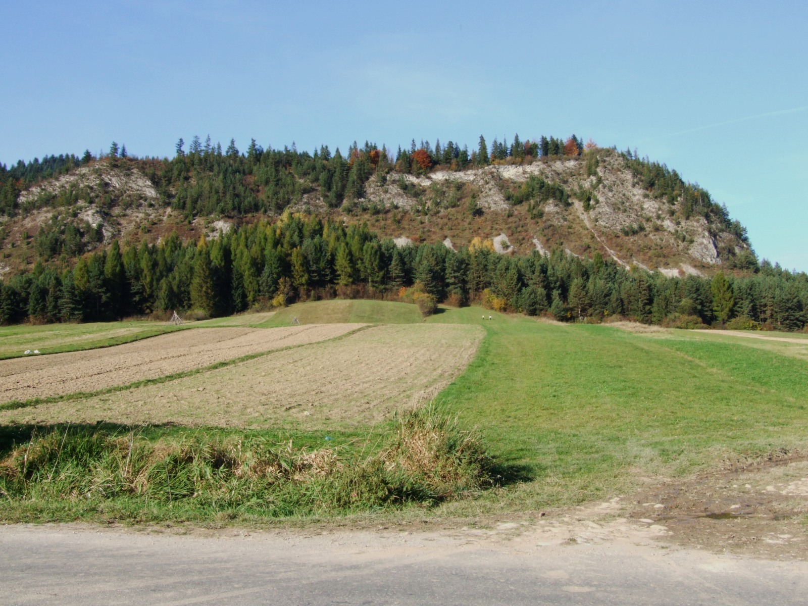 Skały Zamczysko w Pieninach Czorsztyńskich. Widok z szosy do Sromowiec Niżnich